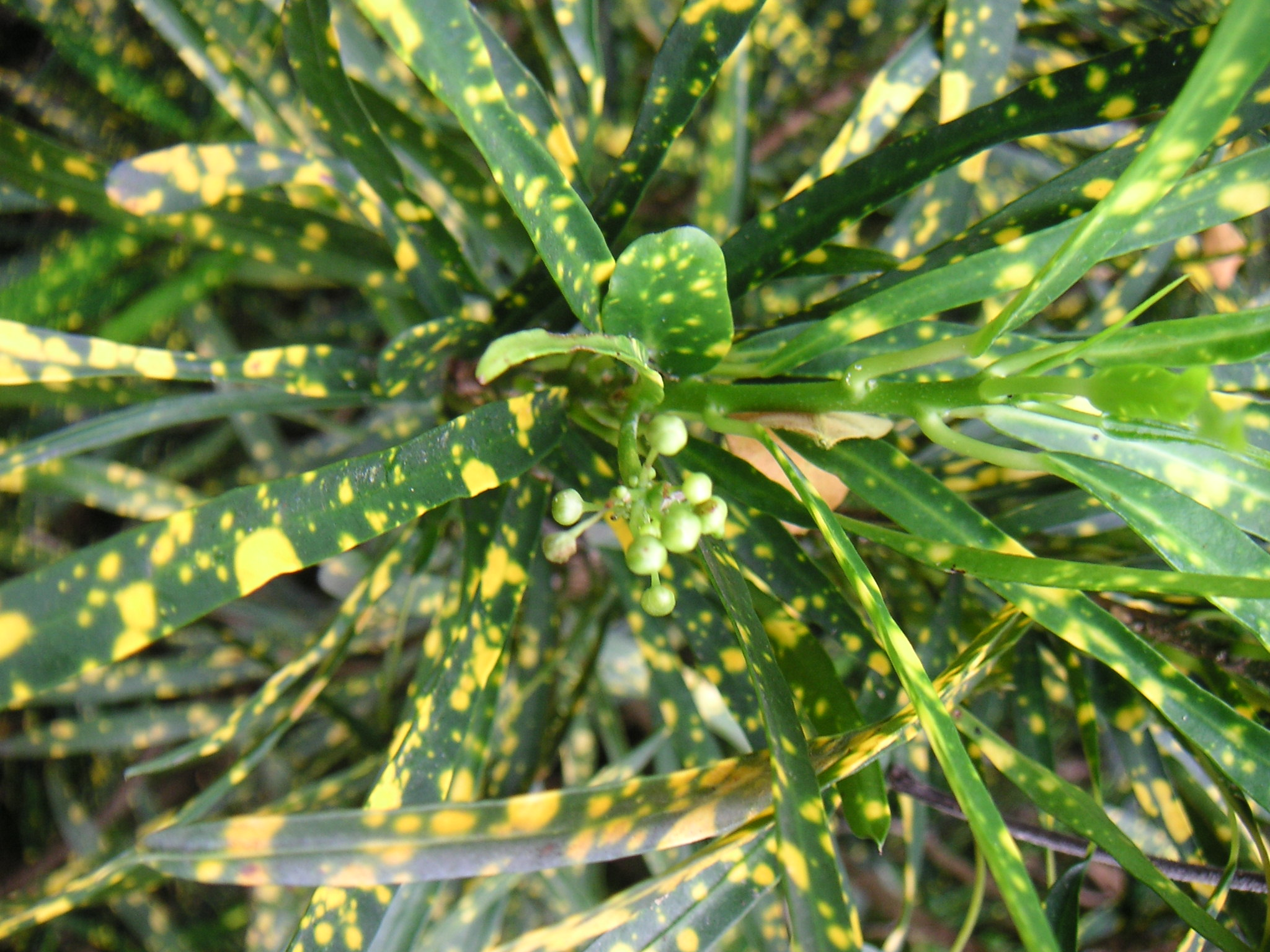 Codiaeum variegatum, Euphorbiaceae, Cali / Kolumbien